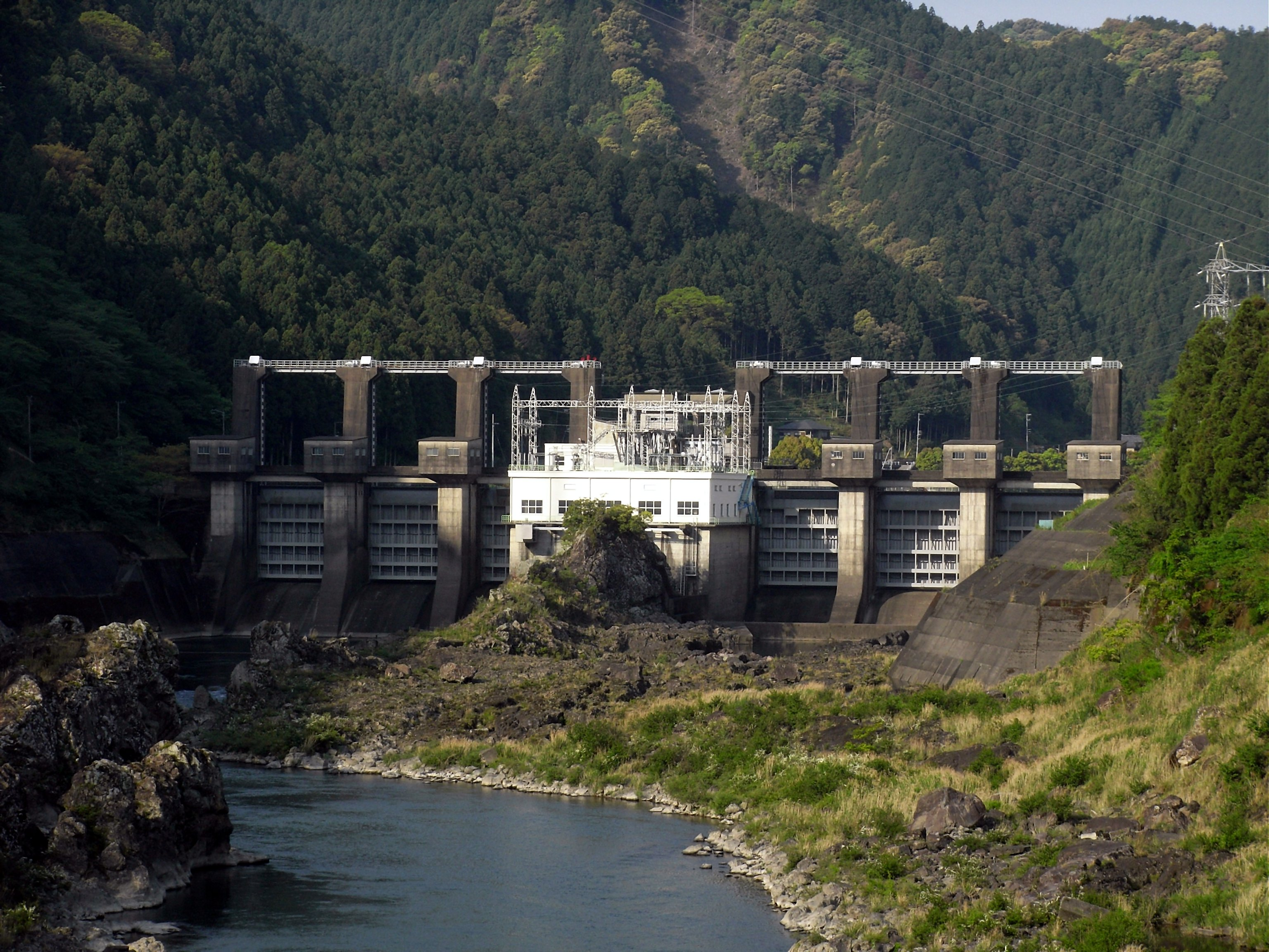 Dam